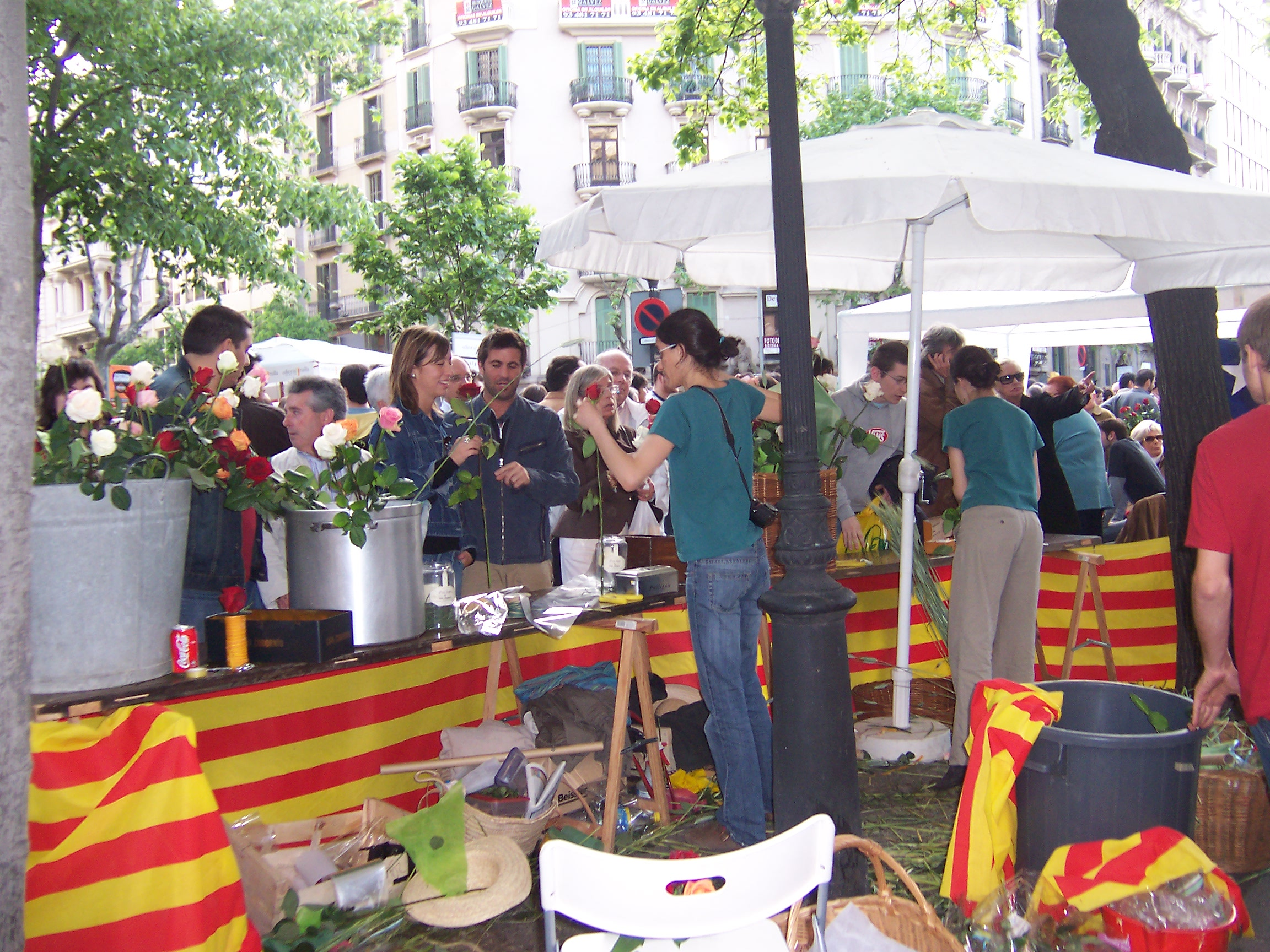 Puesto de venta de rosas en una calle de Barcelona, el Día de Sant Jordi.